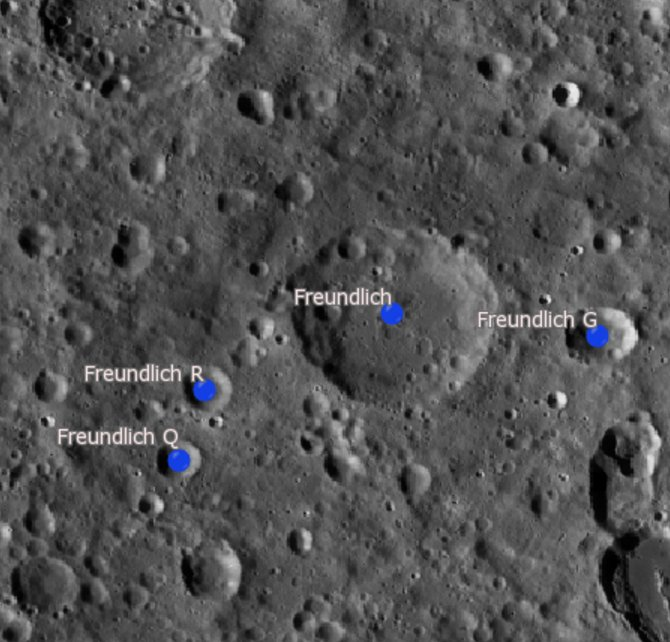 Cráter lunar Freundlich. Cráteres satélite. (Imagen LRO)